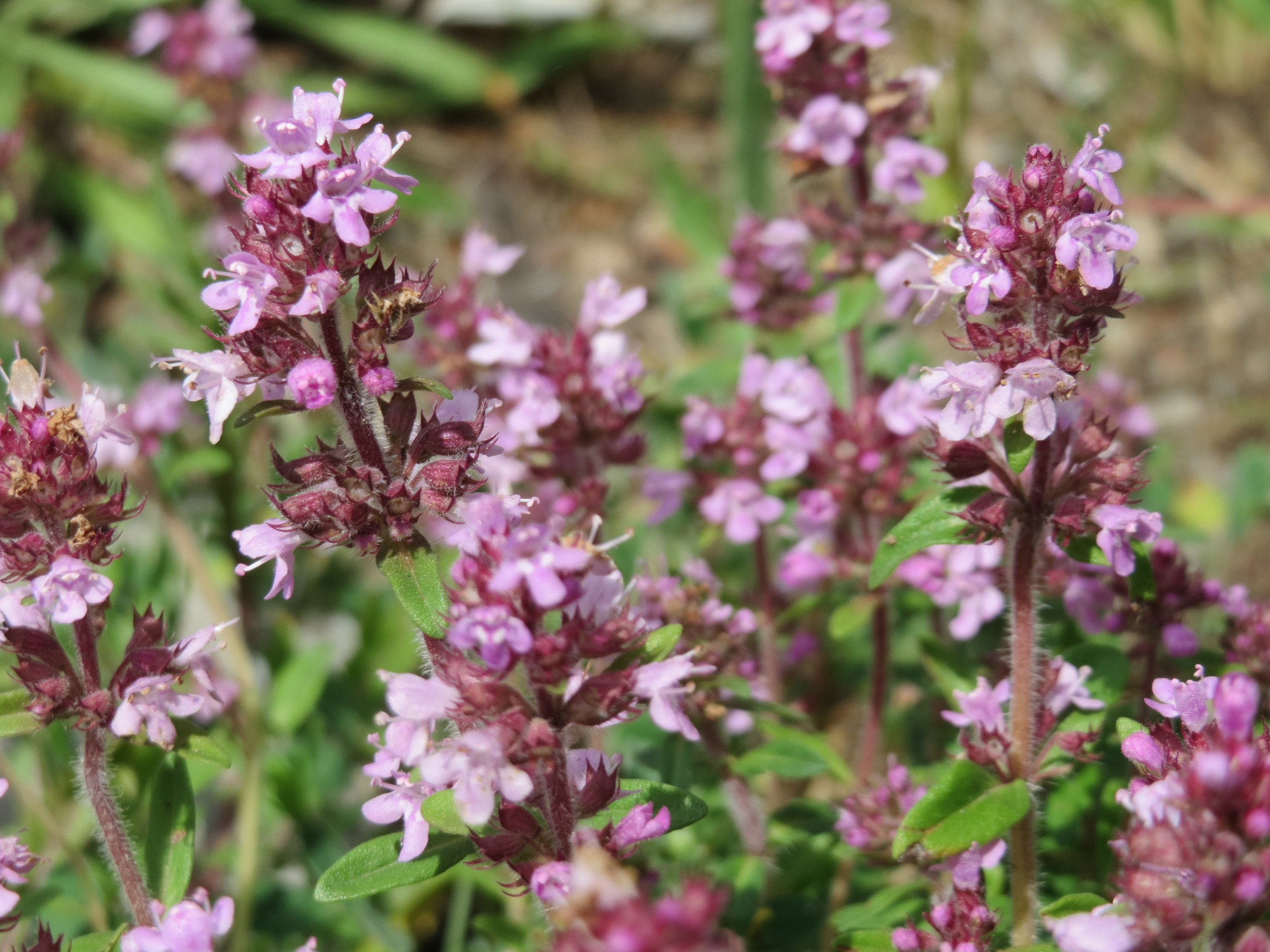 Sand-Thymian (Thymus serpyllum) am Stadtrand von Hockenheim